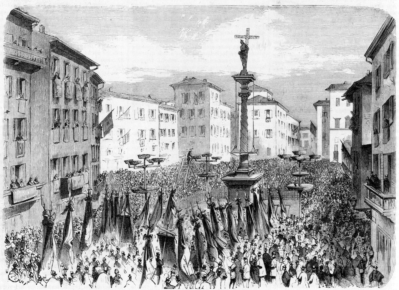 "Commemorazione delle Cinque Giornate - I veterani delle patrie battaglie depongono corone votive sulla colonna del Verziere"